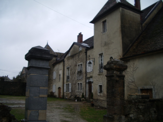 Propriété du Maréchal Bon Adrien JANNOT dit DE MONCEY à MONCEY (Doubs) - Cliché pris le 11 mars 2006.